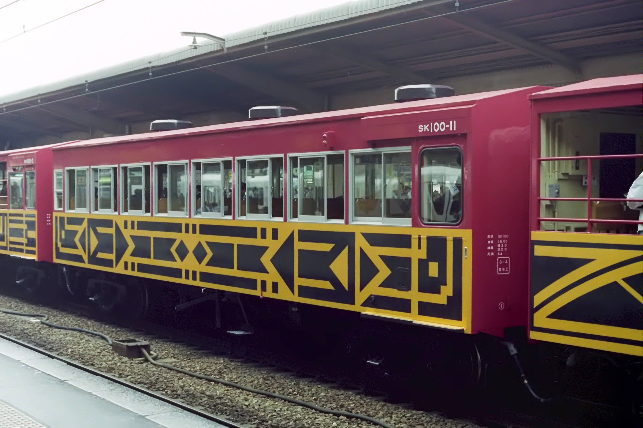 嵯峨野観光鉄道 SK100-11(登場時)